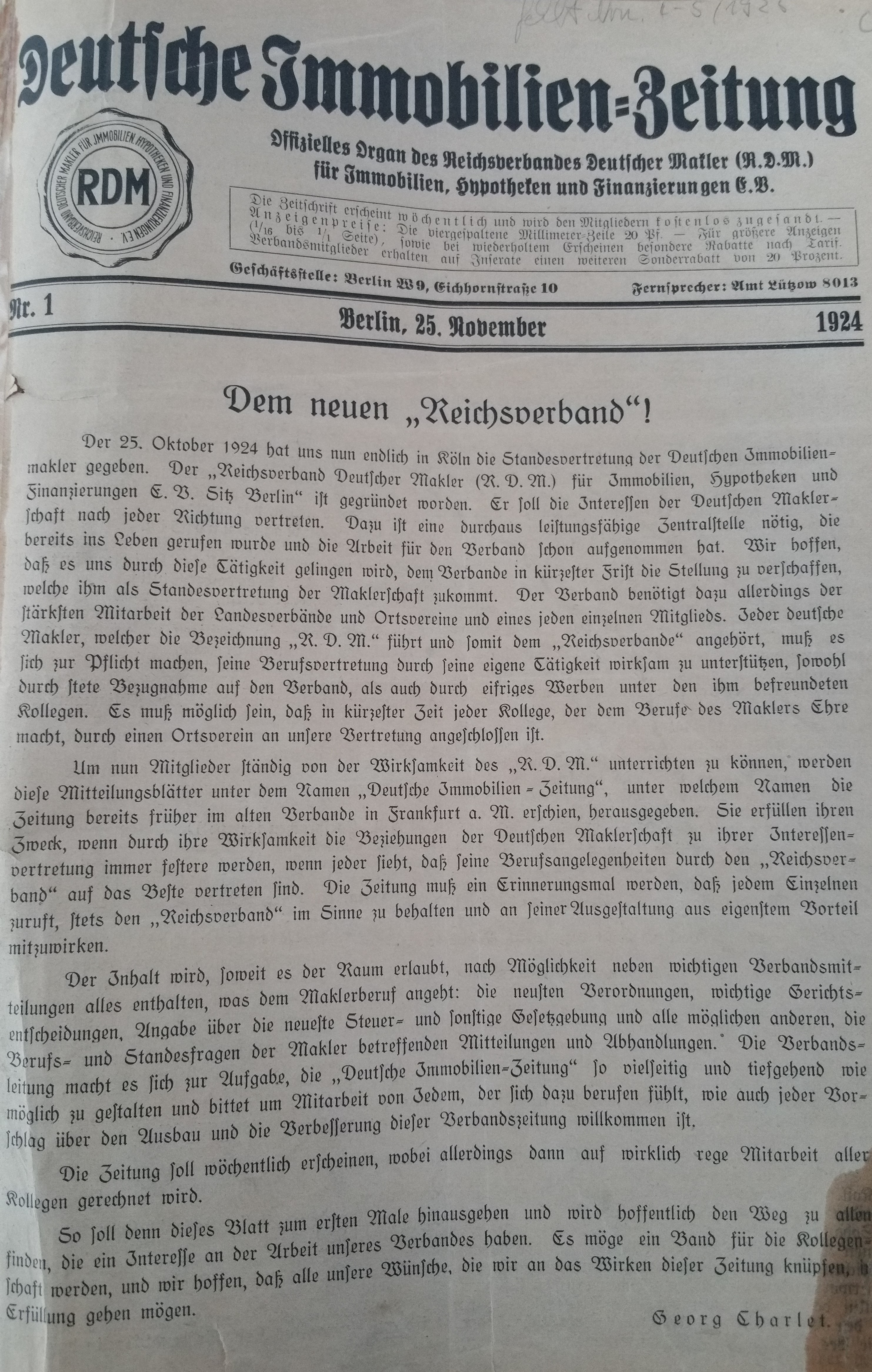 Titelseite der ersten "Deutschen Immoblien-Zeitung" des RDM (25.11.1924)